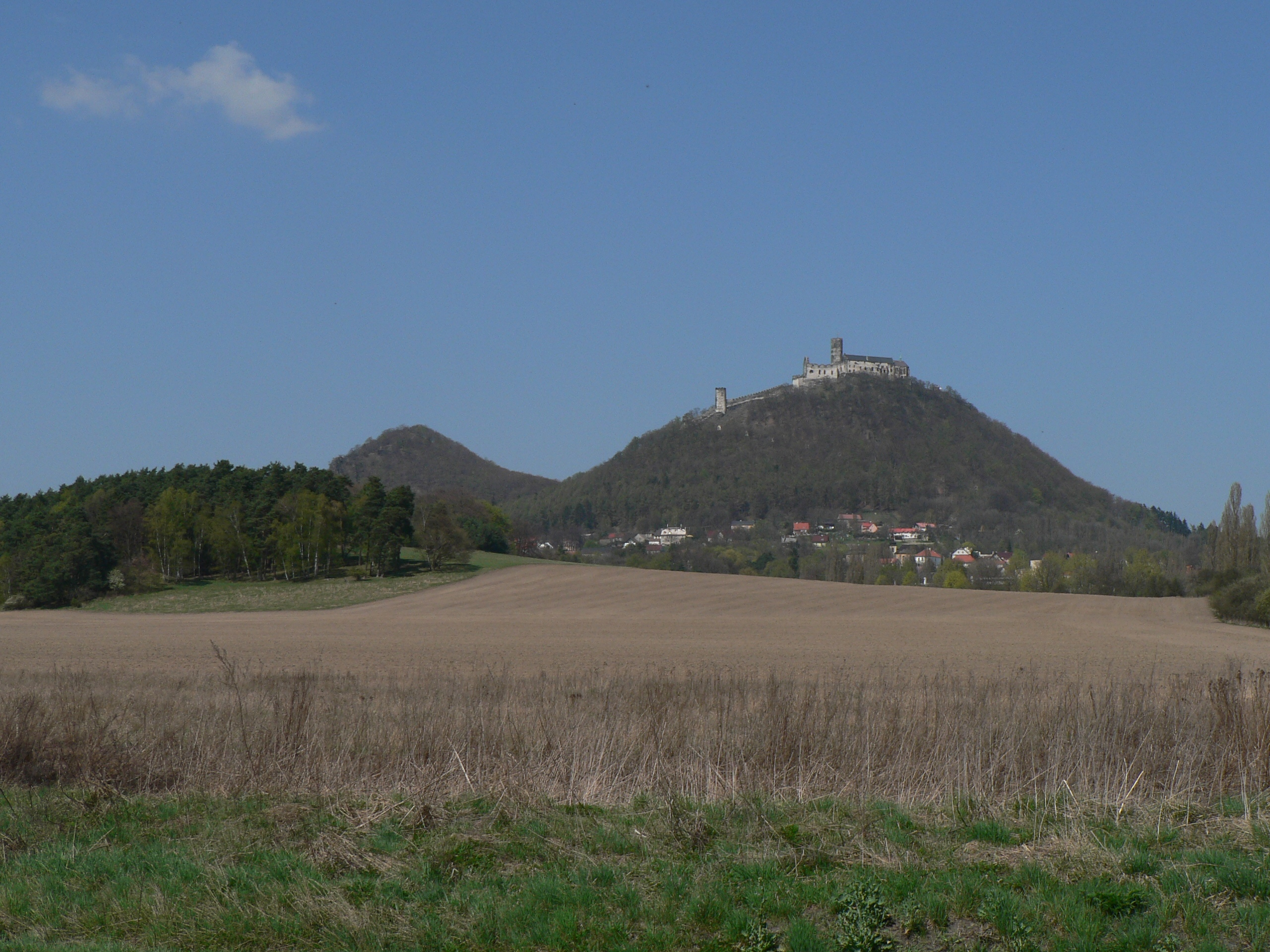 Hrad Bezděz od západu